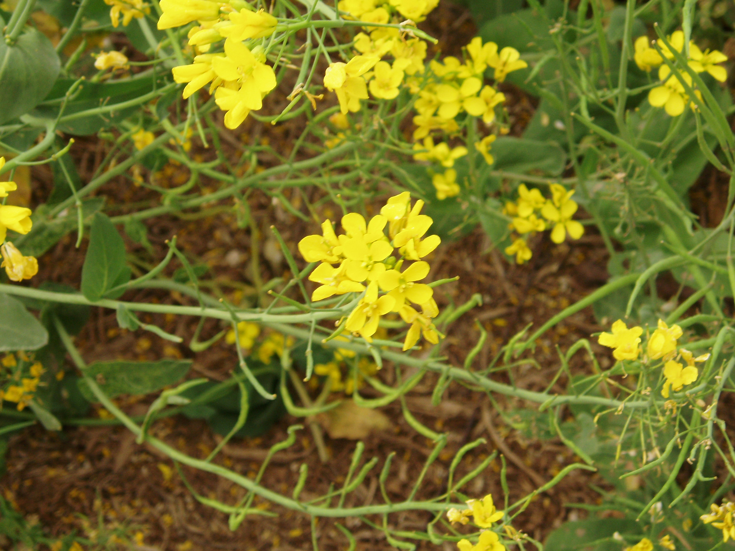 Oriental Cabbage